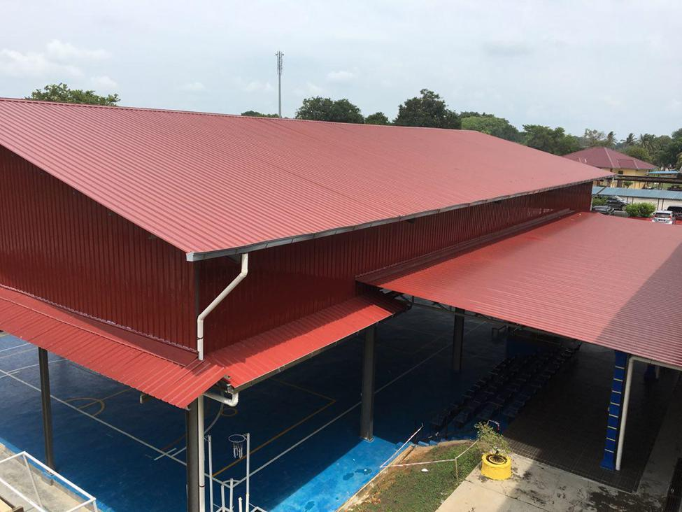 Dewan Terbuka SKKT 1